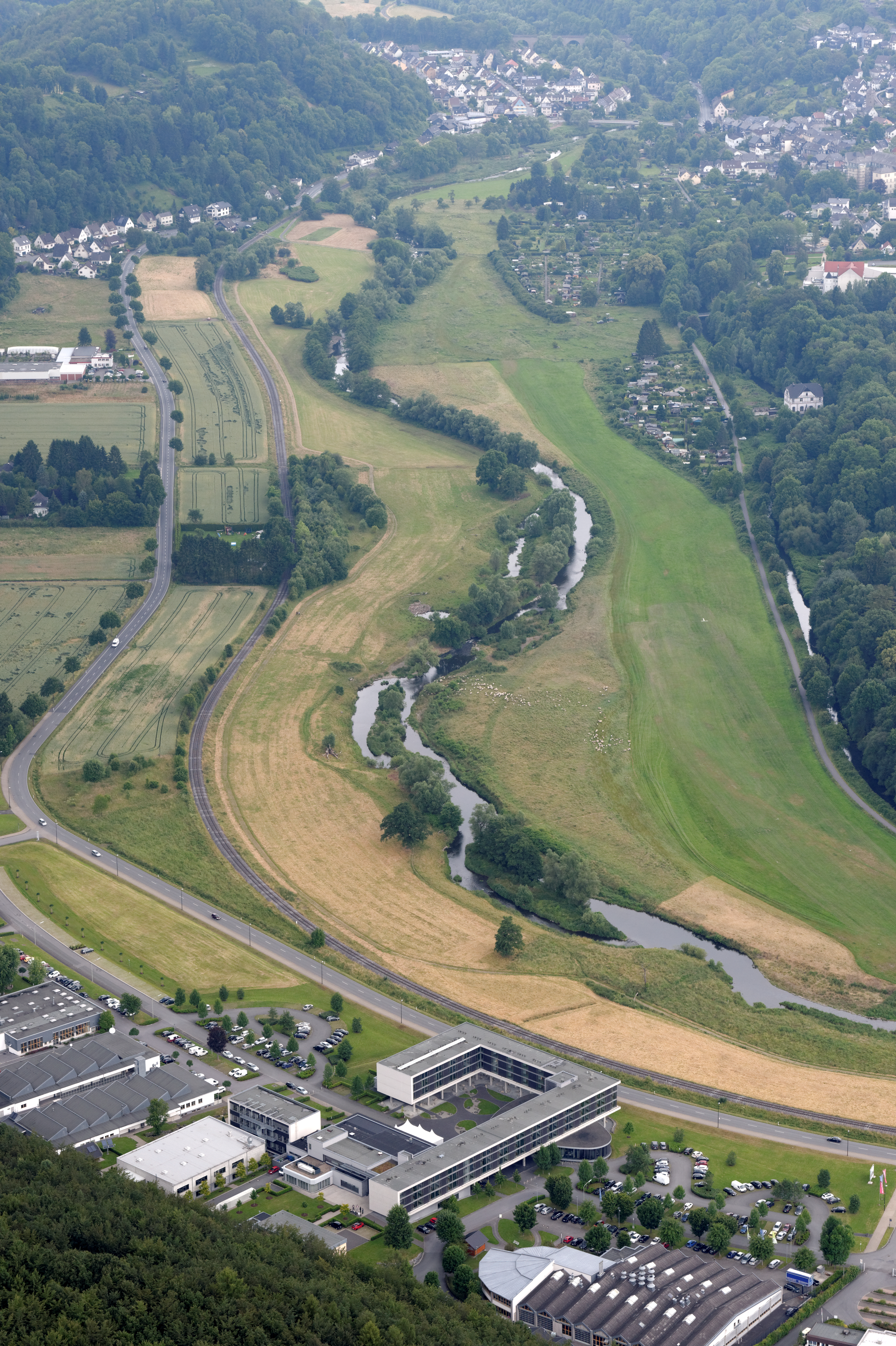 Arnsberg: Altes Feld mit Berufsbildungszentrum, renaturierter Ruhr (im NSG „Ruhrtal“), Segelfluggelände, Mühlengraben mit historischen Kraftwerk, Kleingartenanlagen, Altstadt, Caritas Gartenbetrieb, Kreuzberg, Wennigloher Straße und Obereimer (Fotoflug Sauerland Nord)